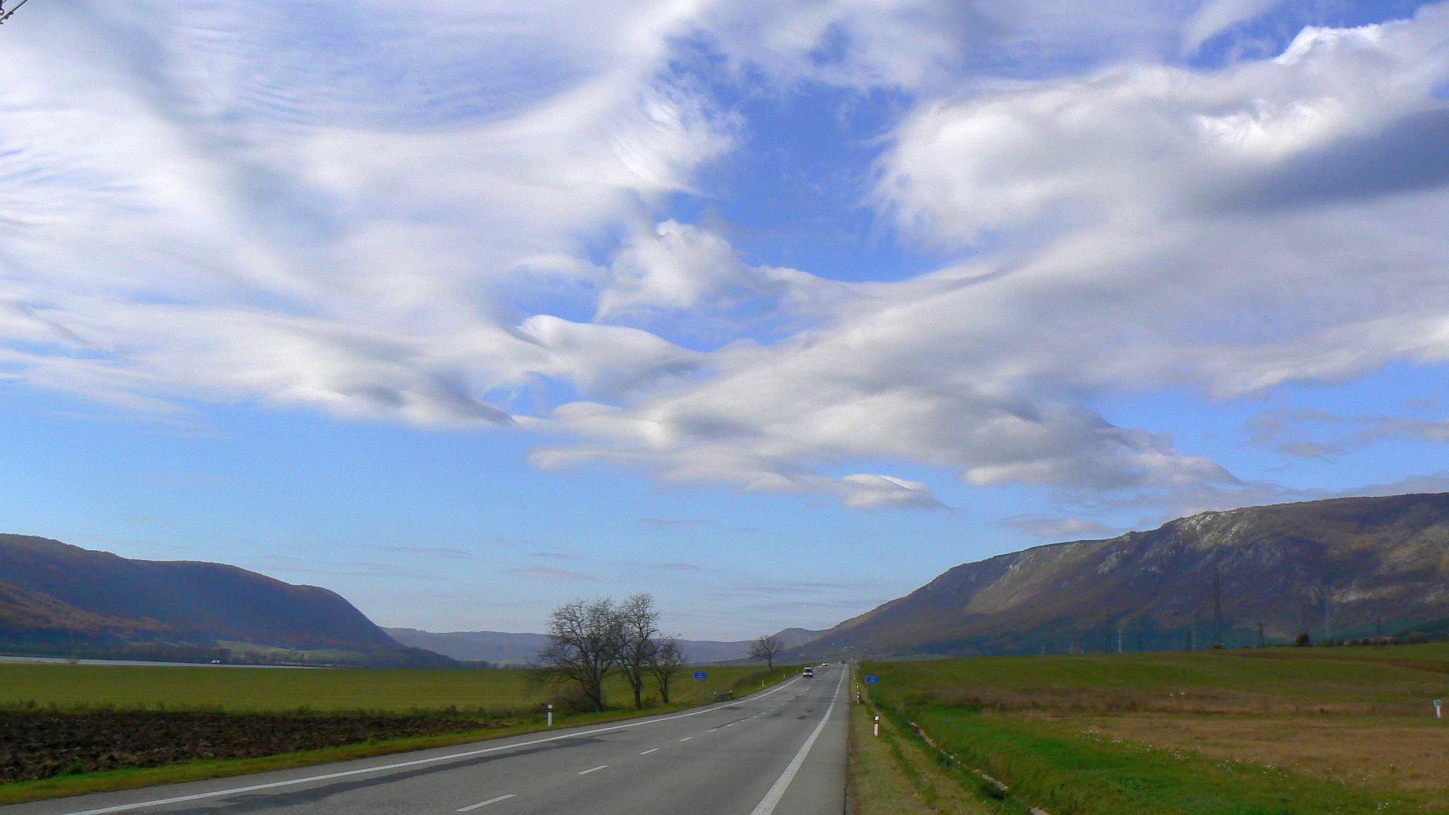 Planiny Dolný vrch a Horný vrch z dna Turnianskej kotliny. Planiny tvoria strednotriasové wettersteinské vápence sprehýbané do tzv. synklinórií. Vzdušné sedlo medzi obomi planinami tvorili kedysi polohy nekrasových spodnotriasových werfénskych vrstiev. Neskôr boli oderodované spätnou eróziou Turne, pričom postupne vznikla gigantická depresia - Turnianska kotlina.